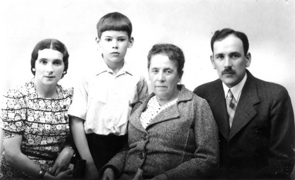 Алексей Ридигер с мамой, папой и бабушкой. Таллин, 1940-е годы